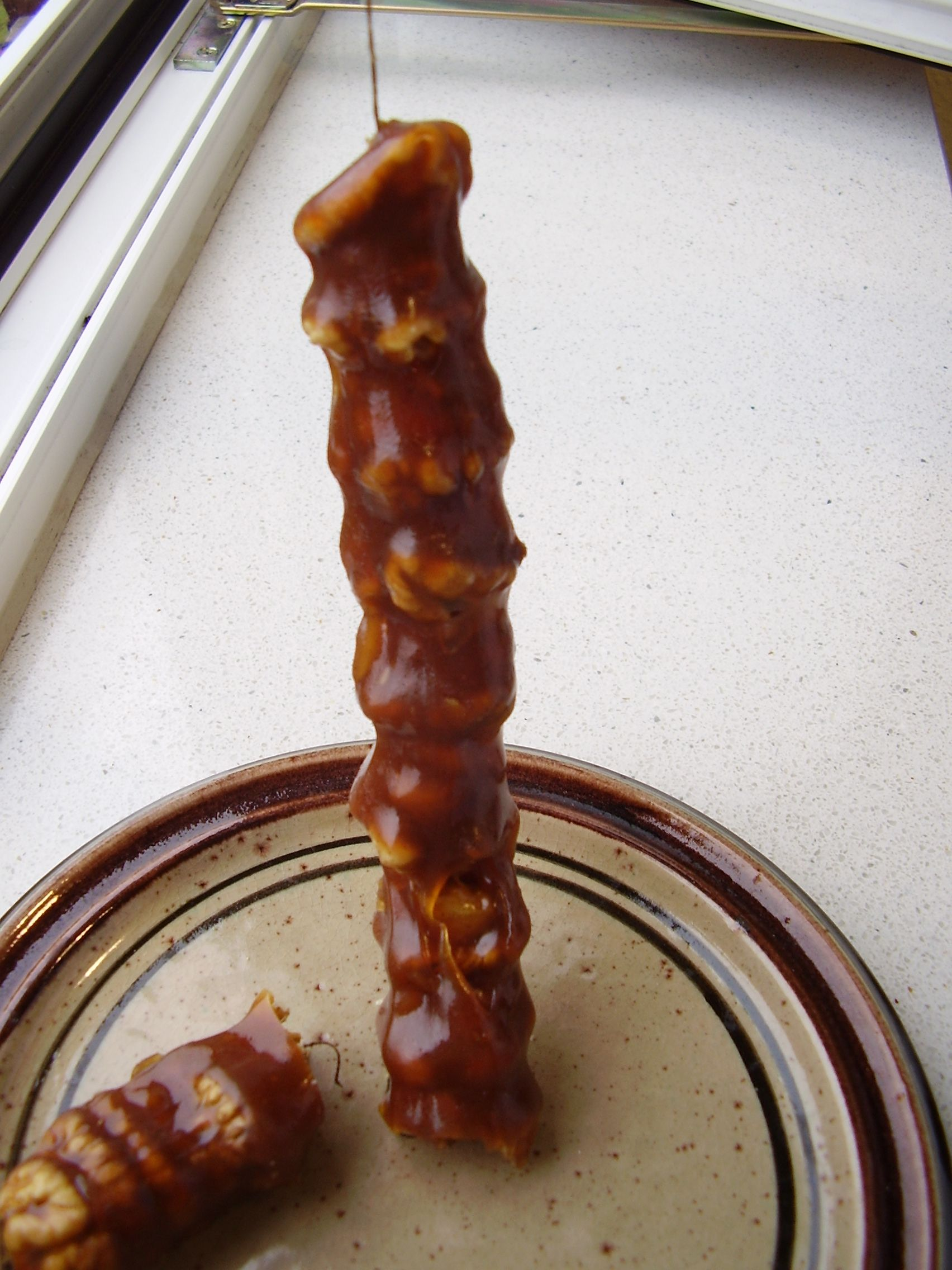 Tschurtschchela from Armenia